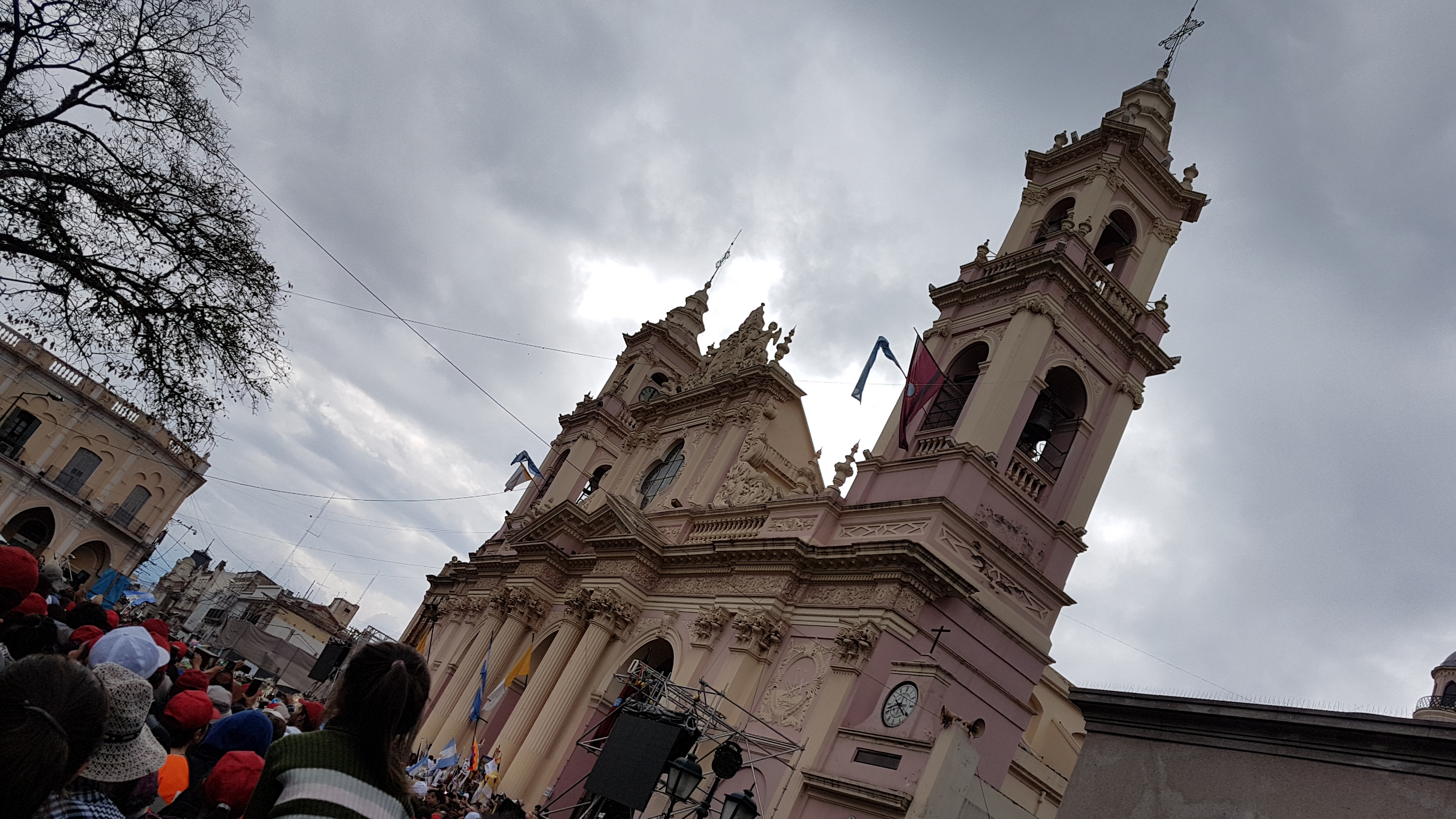 El 17 de enero de 1856, el Gobernador Eclesiástico y Obispo Electo de la Diócesis, don José Eusebio Colombres, organizó la recaudación de fondos para la construcción de una nueva Catedral, ya que la primera había sido destruida por un terremoto. El edificio, terminado en 1882, configura un conjunto singular junto al Palacio Arzobispal, de concepción neocolonial. La iglesia, concebida dentro de la corriente italianizante, tiene planta rectangular de tres naves, profundo presbiterio y un ábside semicircular que contiene al magnífico altar mayor, diseñado por el R.P. Luis Giorgi. El crucero desborda espacialmente en altura con la presencia de la cúpula central, de alto tambor y linterna terminal. Las naves laterales, más bajas, permiten el ingreso de luz natural a través de vitreaux. Sobre el portal de acceso se eleva un cuerpo central de ornamentación barroca, cuyo motivo principal es un óculo lobulado. En la Catedral se venera la imagen del Cristo Crucificado (el Señor del Milagro) Y Virgen del Milagro, su fiesta se celebra cada 15 de Setiembre y convoca a miles de fieles y peregrinos. También alberga al Panteón de las Glorias del Norte, que guarda los restos de los generales Martín Miguel de Güemes, Alvarez de Arenales y Rudecindo Alvarado.fachada de iglesia